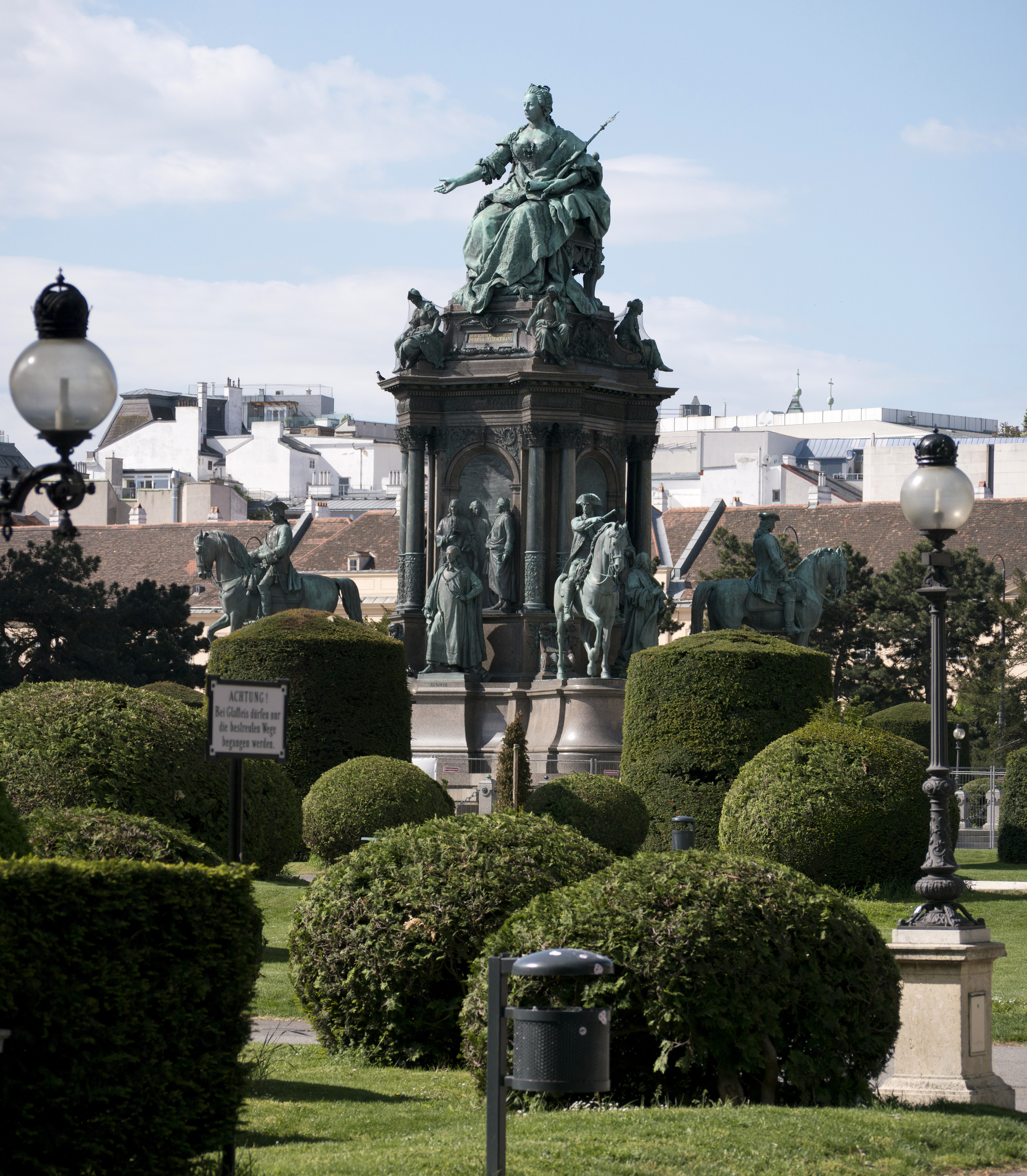 Maria-Theresien-Denkmal